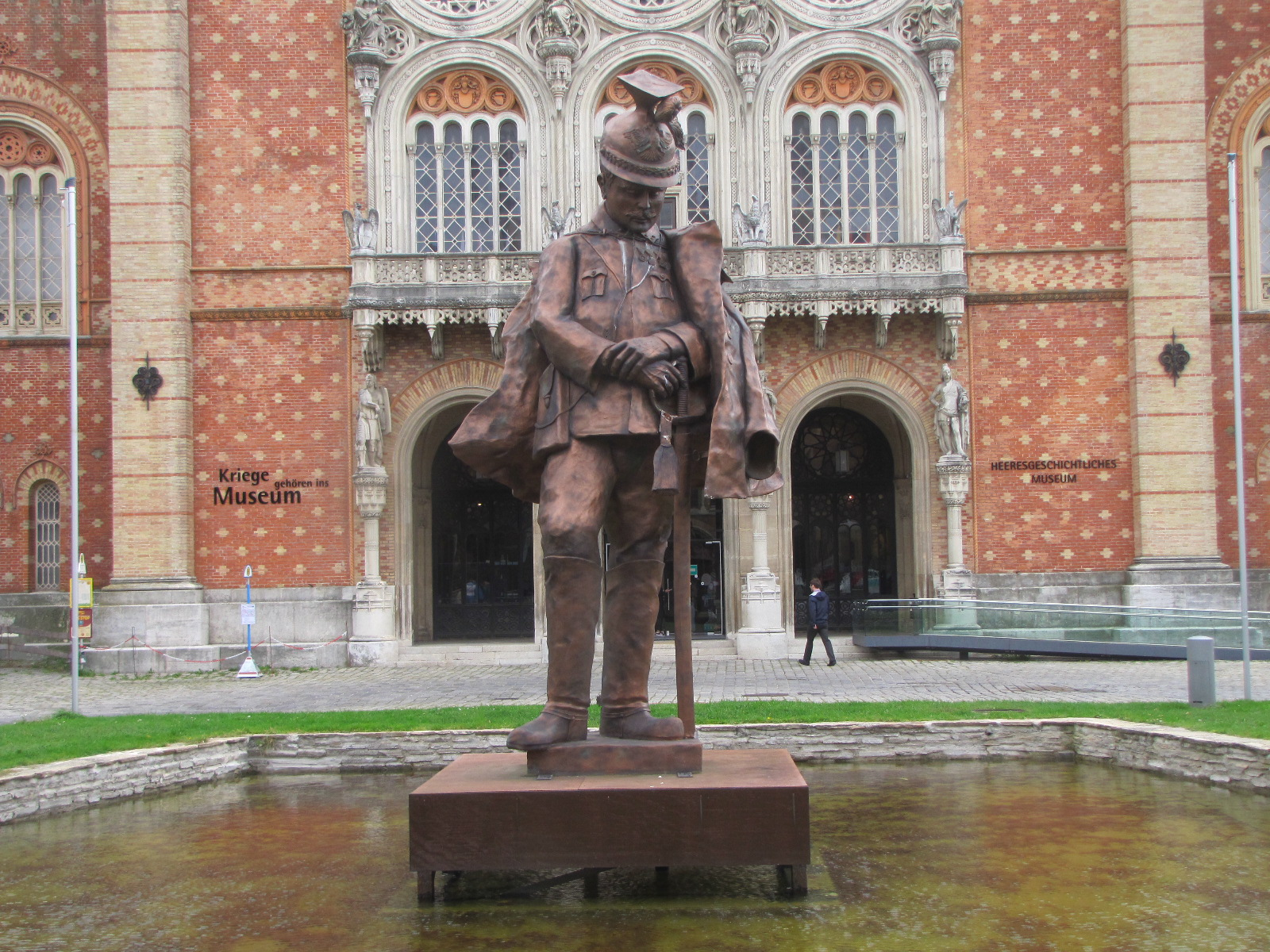 Heeresgeschichtliches Museum, k. u. k. Ulan, auf Säbel gestützt. Nachbildung einer Figur von Arthur Kaan, um 1914/15 Dieses Bild wurde anlässlich des österreichischen Tags des Denkmals 2017 in Wien eingereicht. Diese Datei wurde im Rahmen von WikiDaheim 2017 in Österreich erstellt und hochgeladen.Sie wurde dem Themenbereich Denkmalschutz zugeordnet.